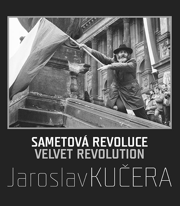 Kniha vyšla v nakladatelství JAKURA